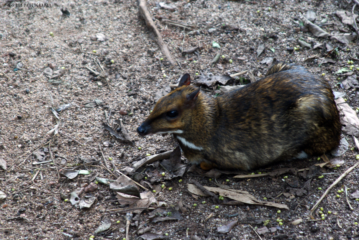 Kancil (in Malay) at Zoo Melaka, Malaysia.